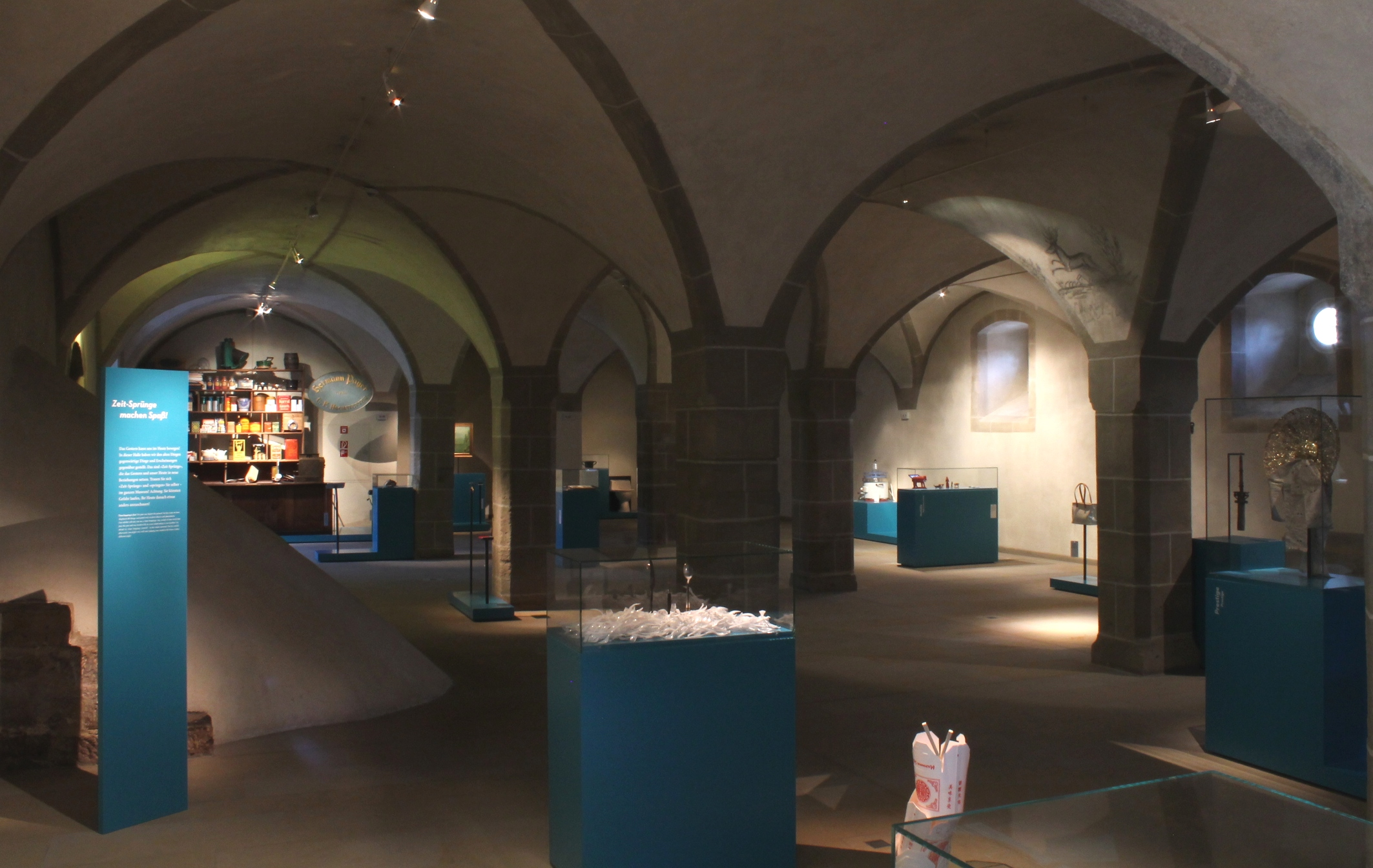 Blick in die Zeitsprunghalle des Museums der Alltagskultur Waldenbuch